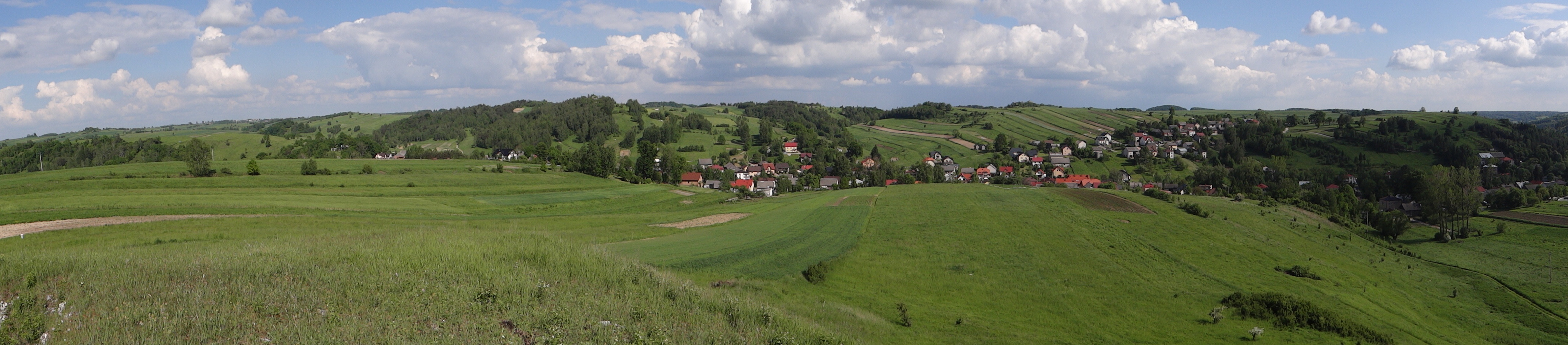 Dolina Czubrówki i Racławki. Widok ze Srokowej Skały